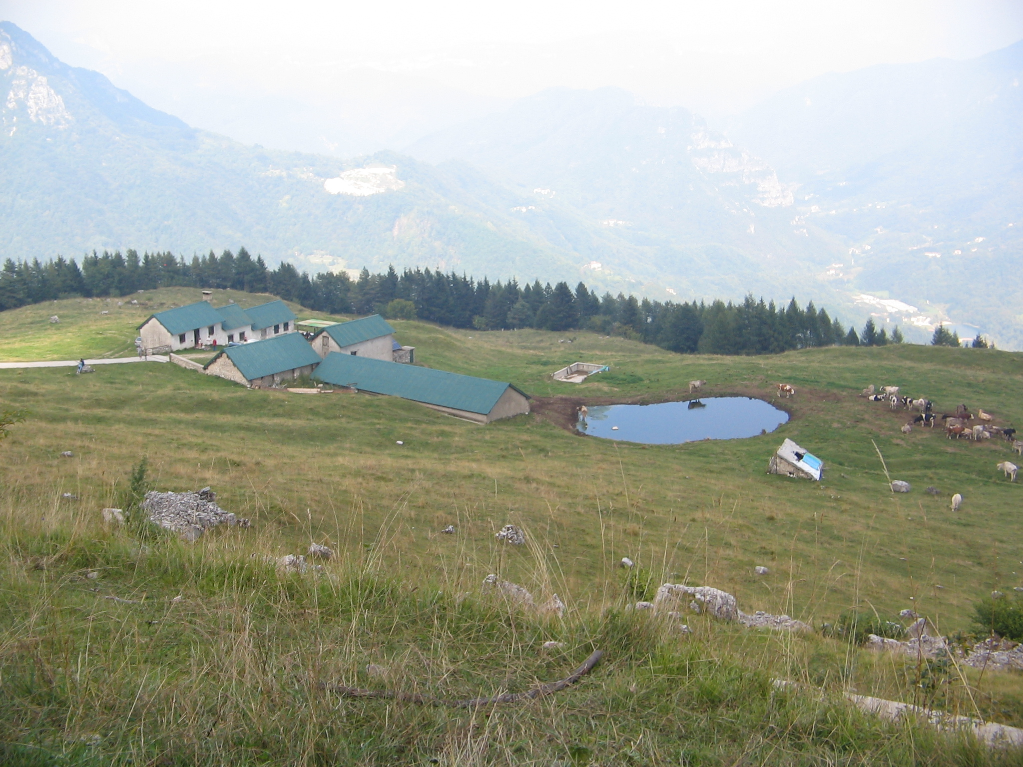 Malga Campiglia, Strada dei Scarubi, Pasubio